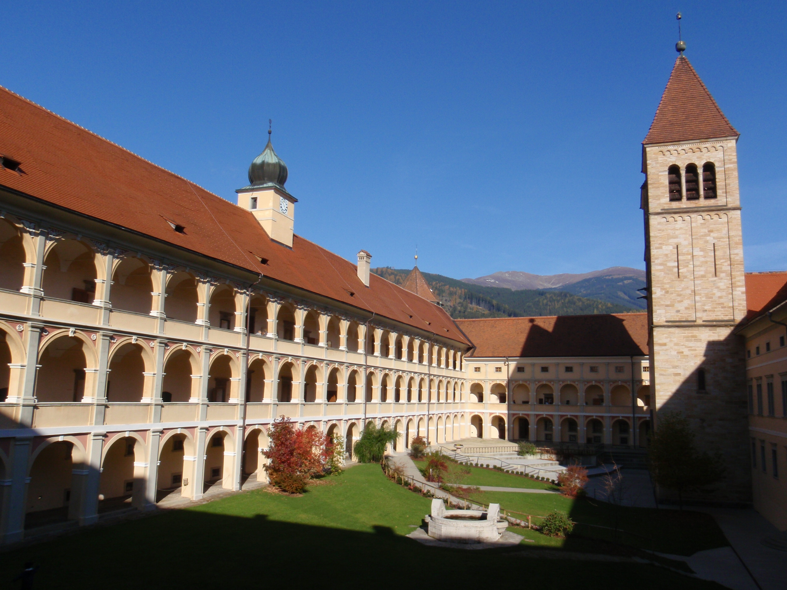 Äußerer Klosterhof Benediktinerabtei Seckau; eigene Aufnahme des Autors